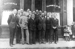 Wilhelm Hapsburg in vienna